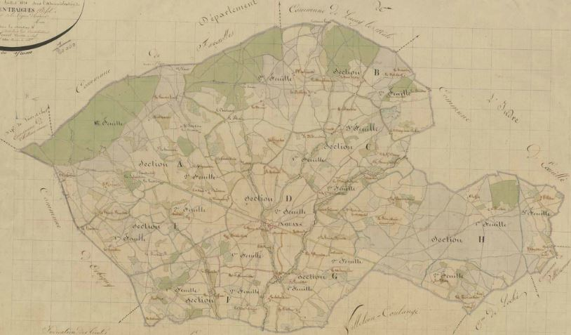 Plan d'assemblage cadastral de Nouans-les-Fontaines, en Indre-et-Loire. Première moitié du XIXe siècle